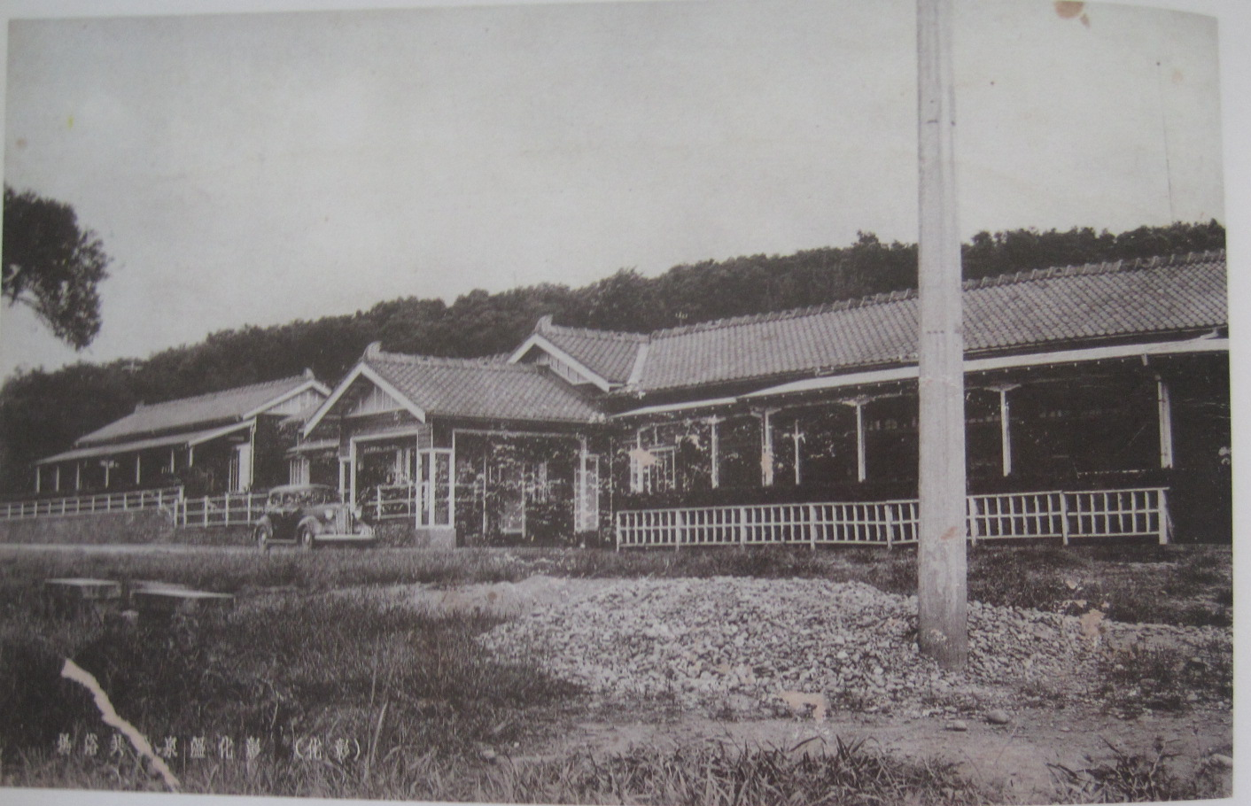 彰化溫泉公共浴場。翻拍自《八卦山史蹟文物展〈圖錄〉》（1999），原件為公開超過50年的照片，依著作權法的製版權相關規定屆滿十年後製版權消滅，故已進入公眾領域。